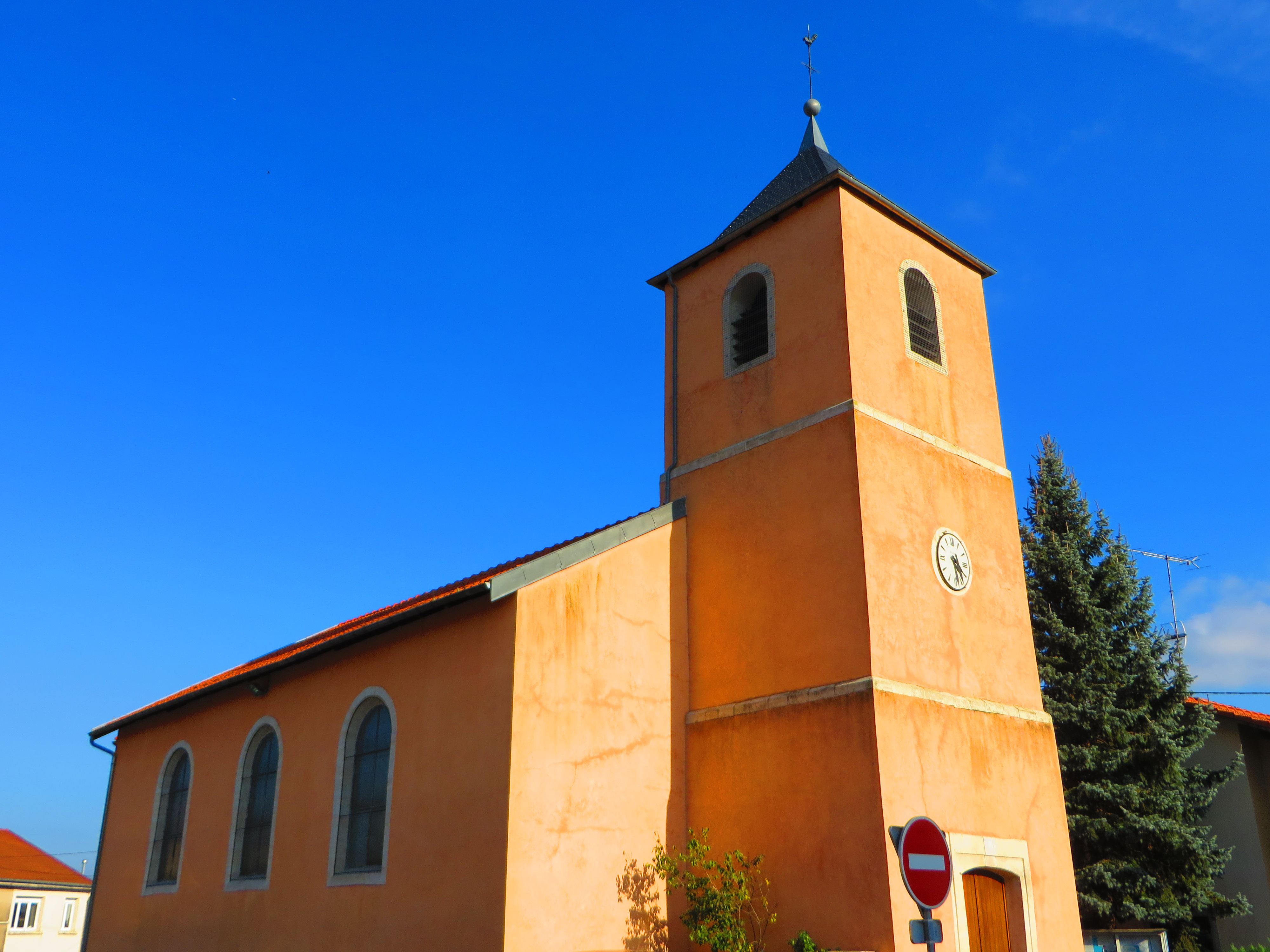 Amelécourt l'église Saint-Martin